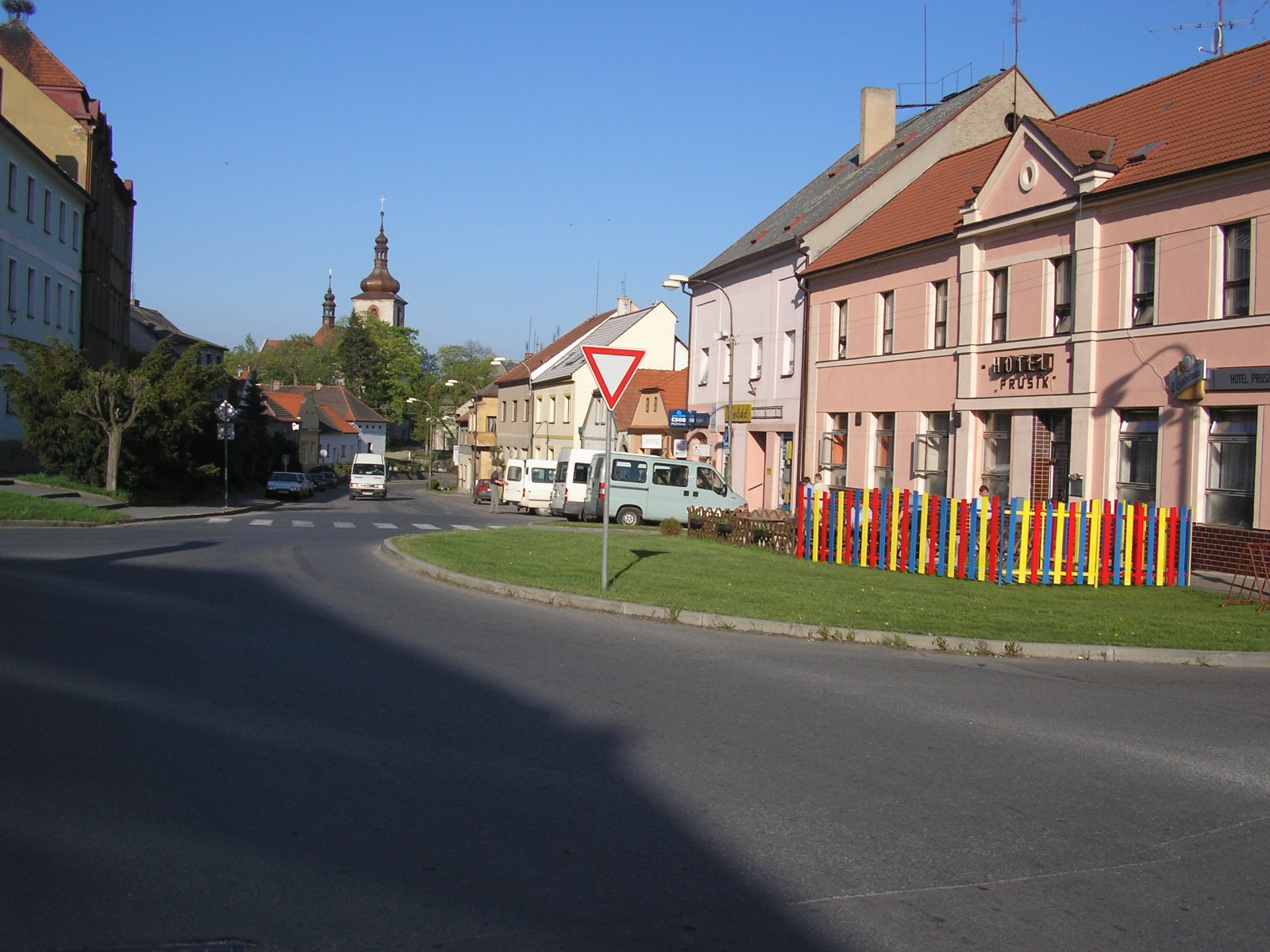 Kralovice - náměstí